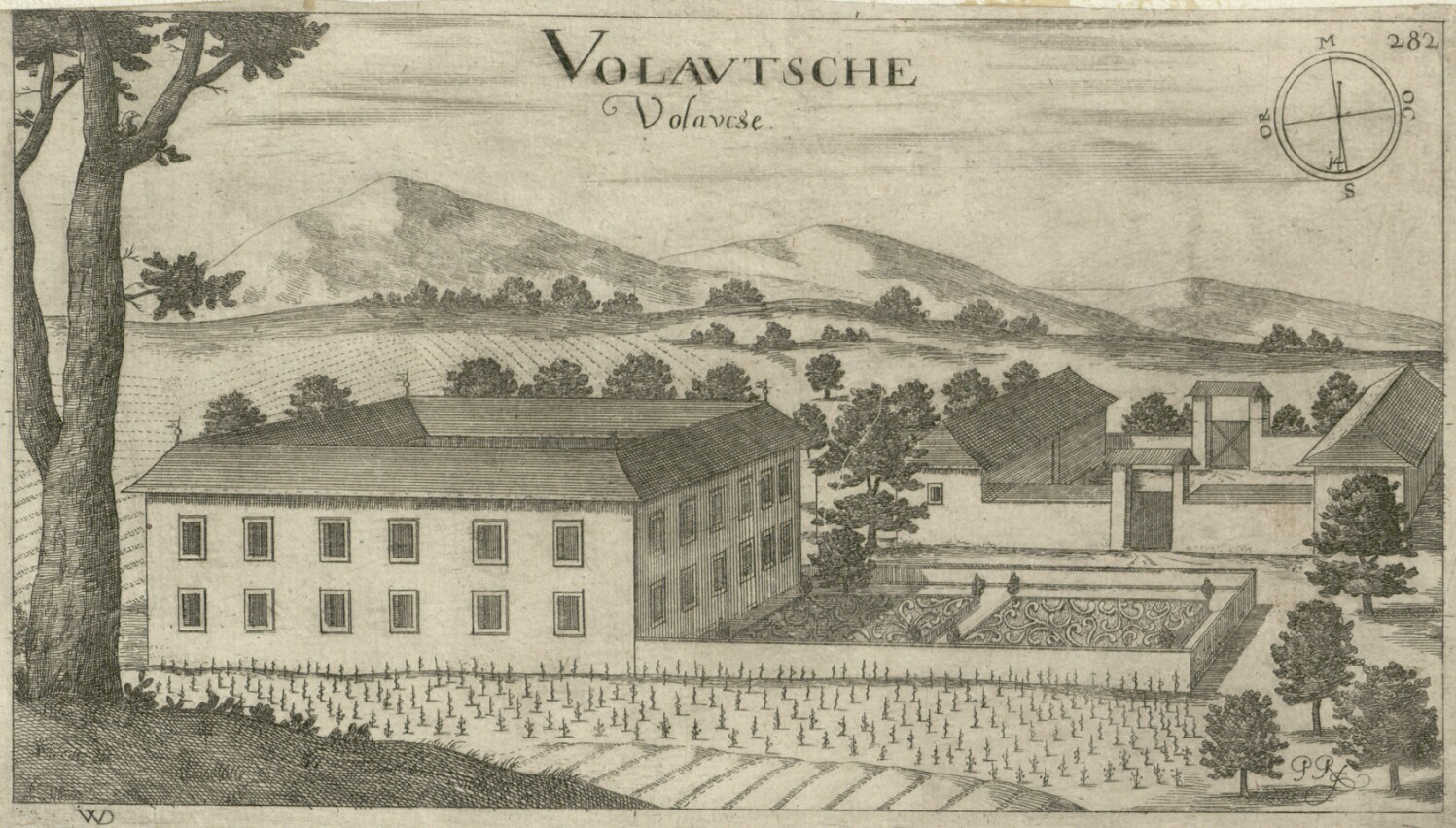 Dvorec Volavče